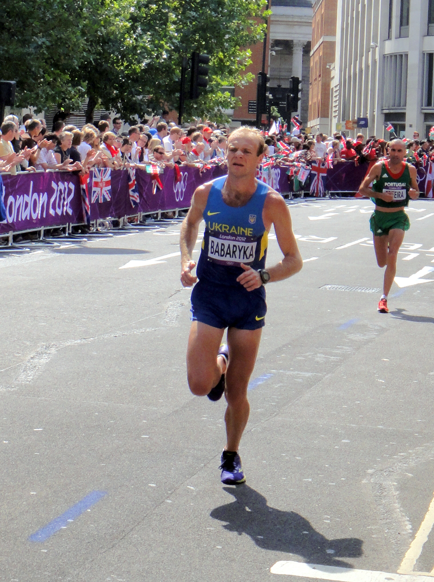 Ivan Babaryka (Ukraine) - London 2012 Men's Marathon